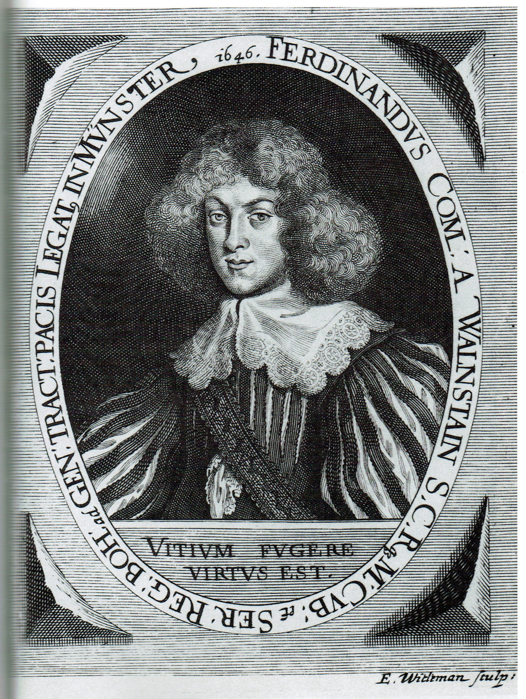 Ferdinand Arnošt z Valdštejna, rytina Widemann, 1646